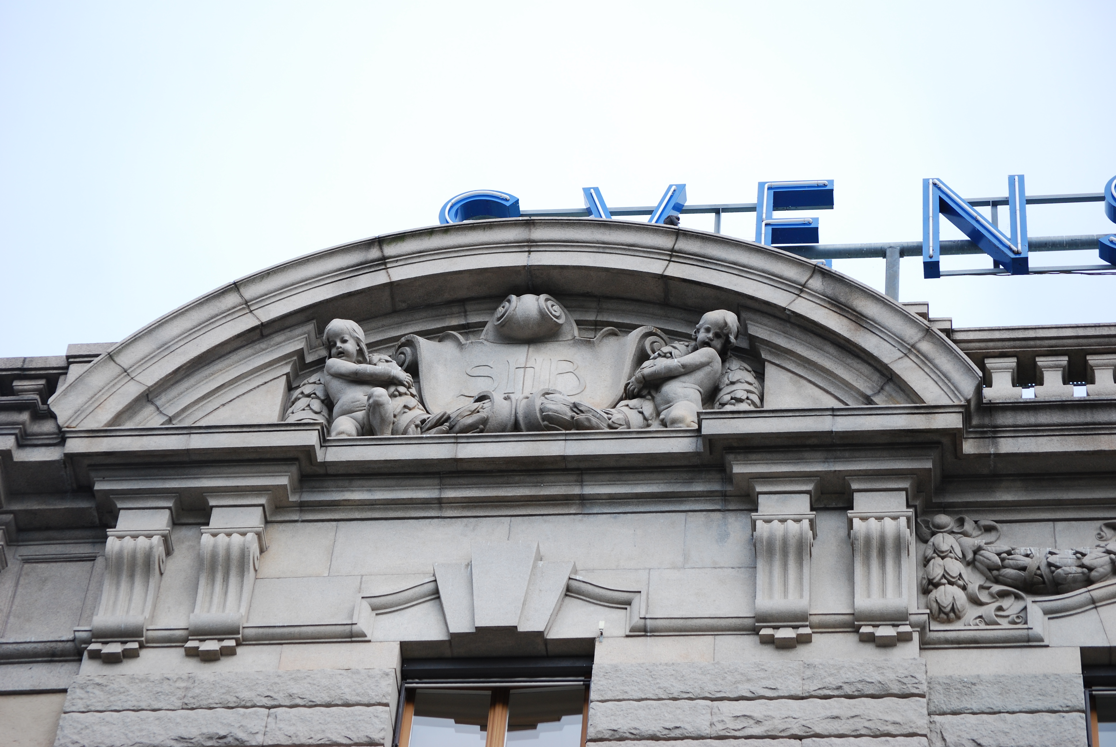 Fronton på Handelsbankens huvudkontor, Kungsträdgårdsgatan 4, Stockholm